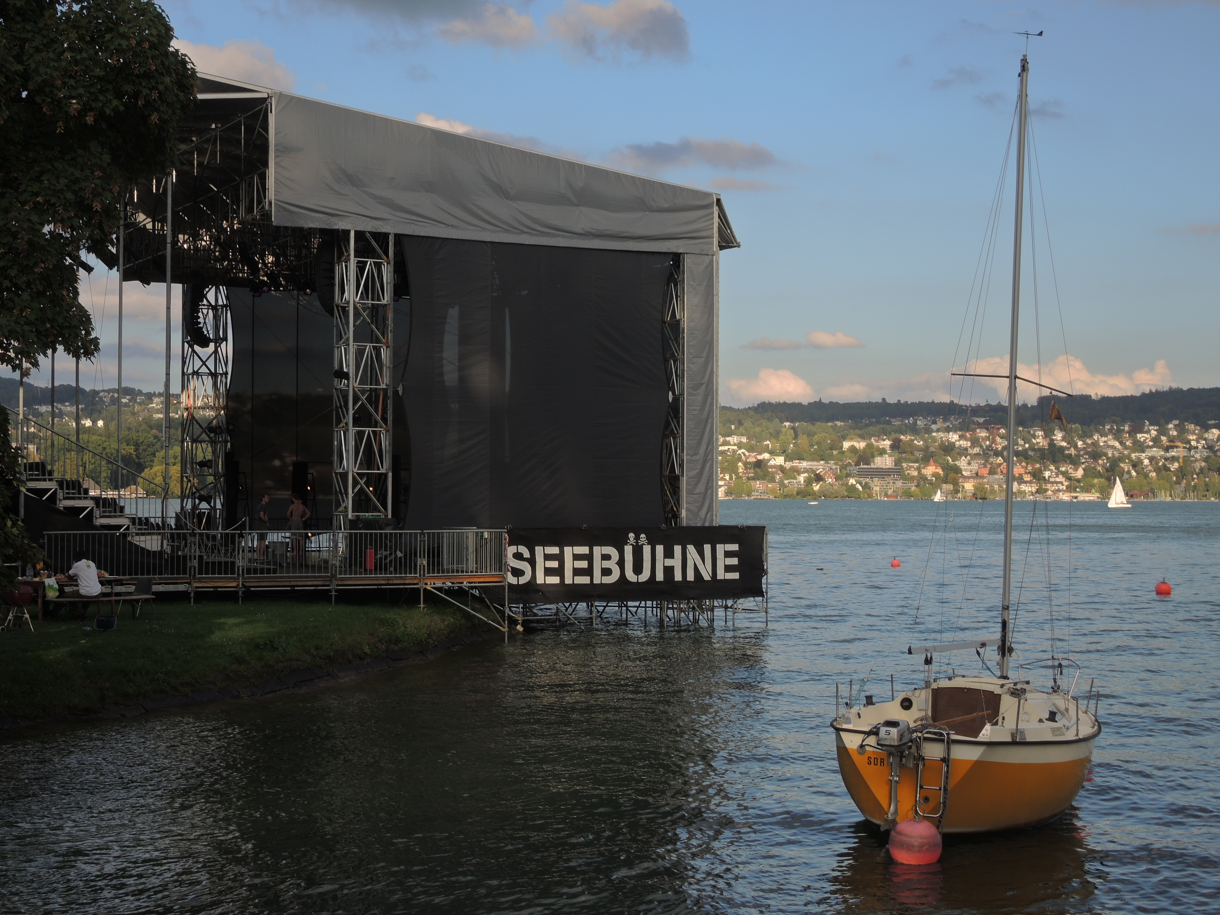 Theaterspektakel in Zürich-Wollishofen (Switzerland)